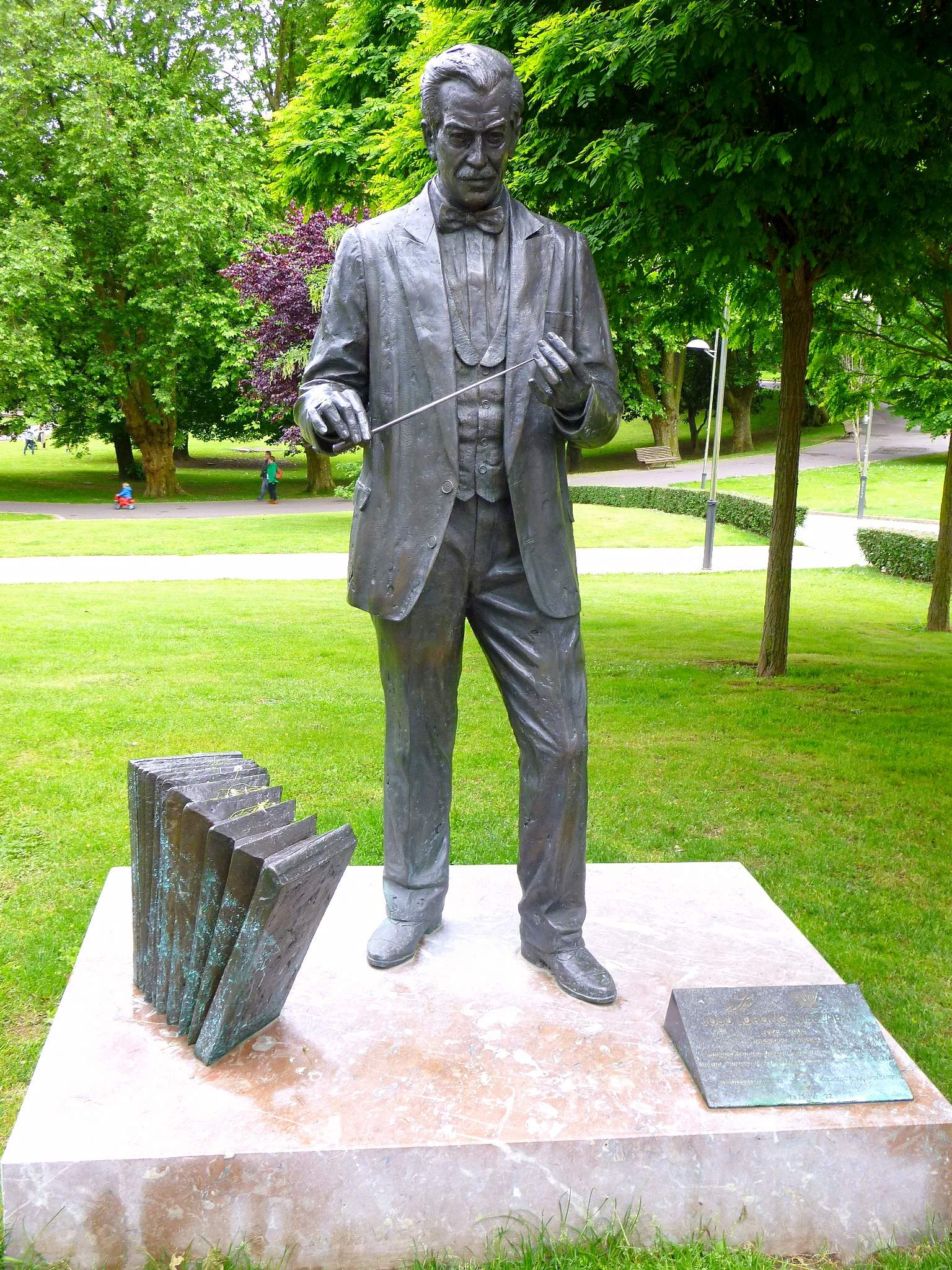 Monumento al profesor de musica y compositor Josu Loroño Elgezabal (1929-2008), en el Paseo de Rafael Sánchez Mazas de Bilbao